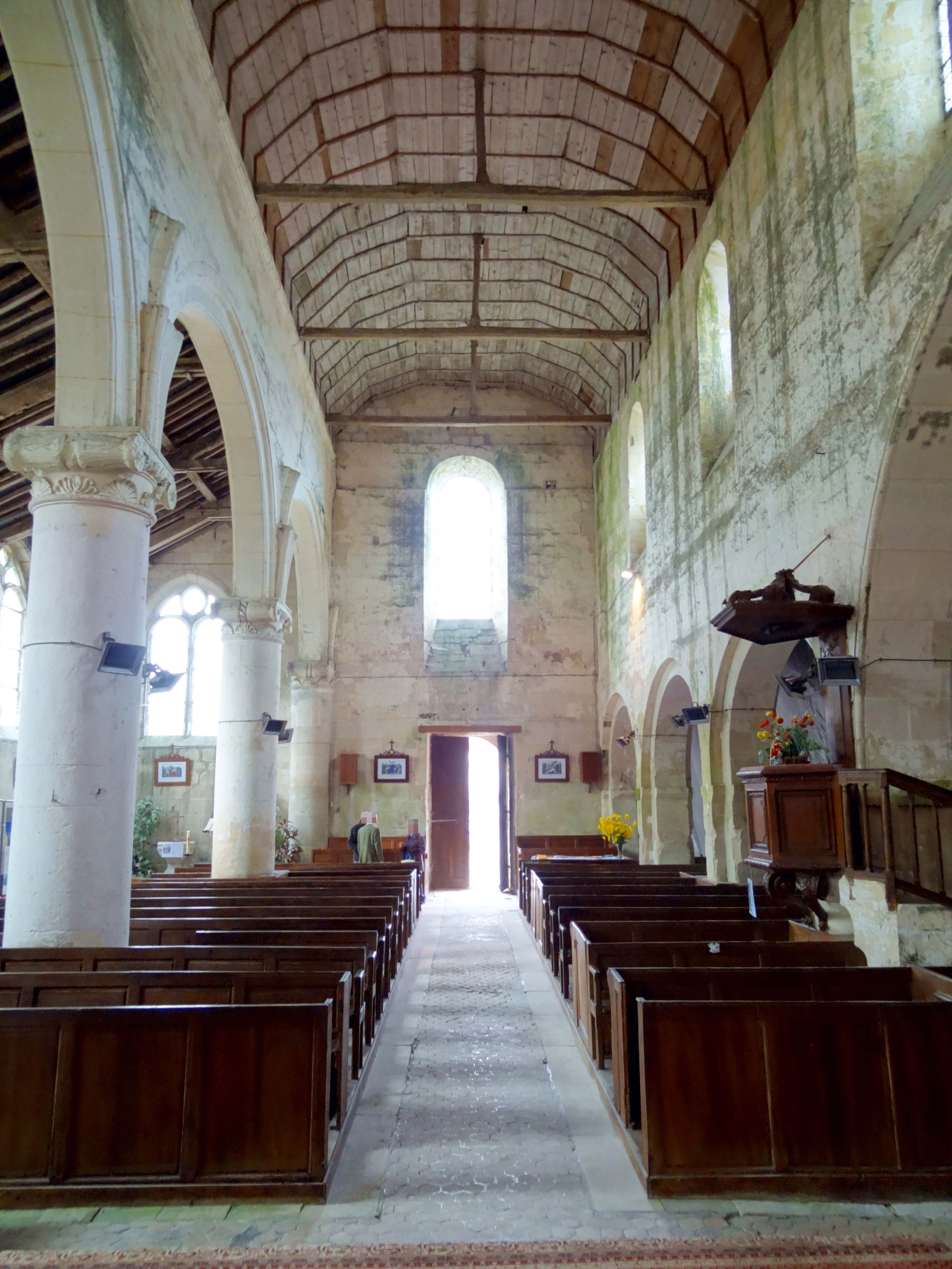 Intérieur de l'église - voir titre.